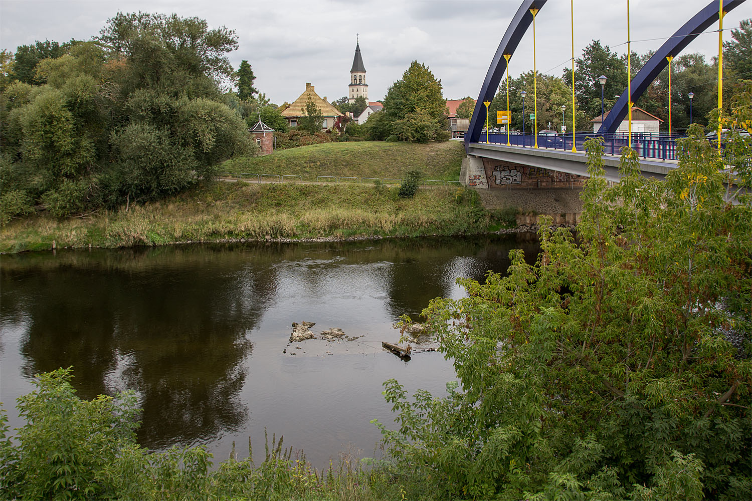 Muldebrücke Bad Düben, Stützpfeiler der ehemaligen "Brücke des Friedens" aus dem Jahr 1959 im Wasser der Mulde